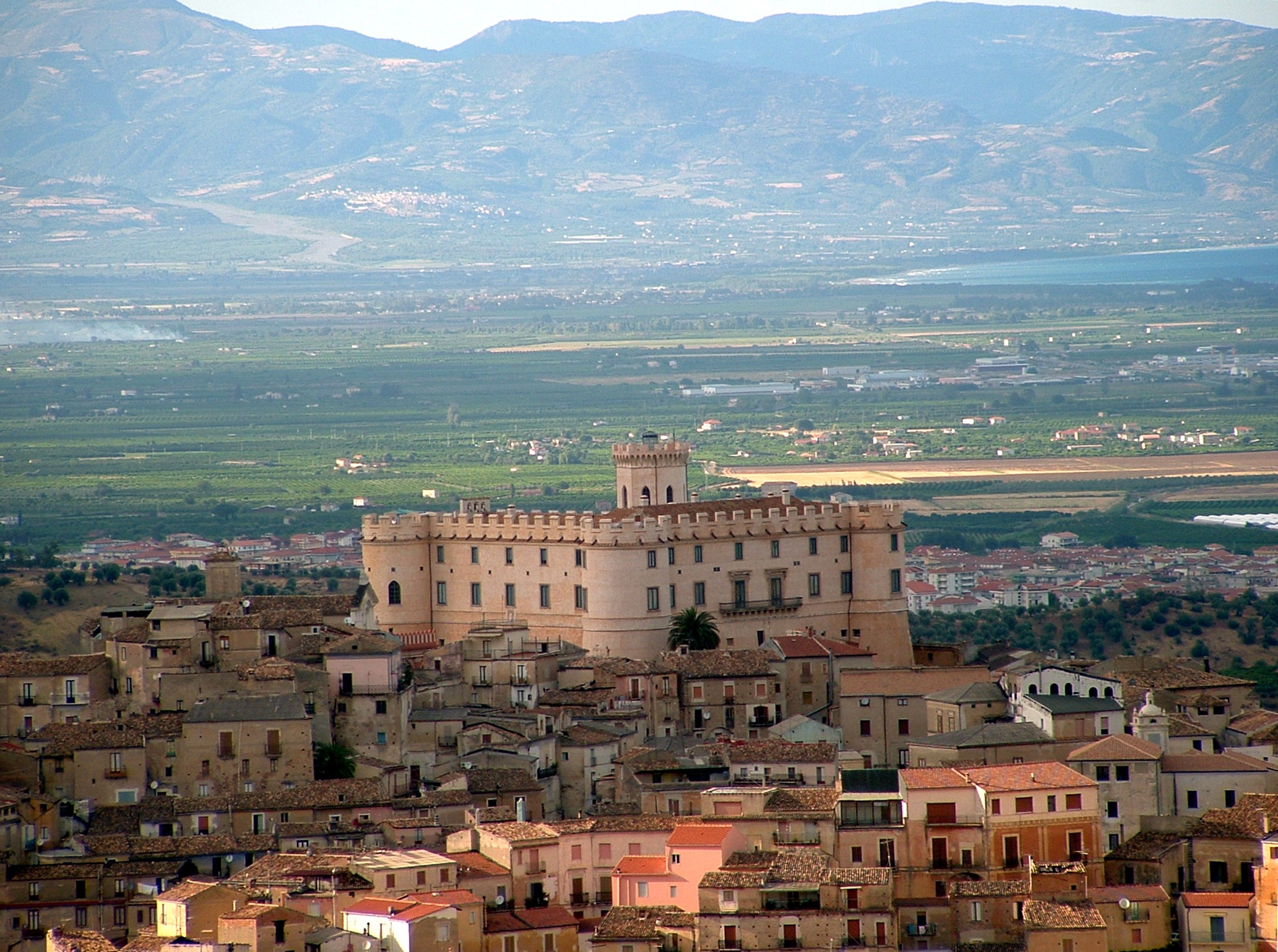 Il castello, il borgo di Corigliano e la Piana di Sibari, Italy